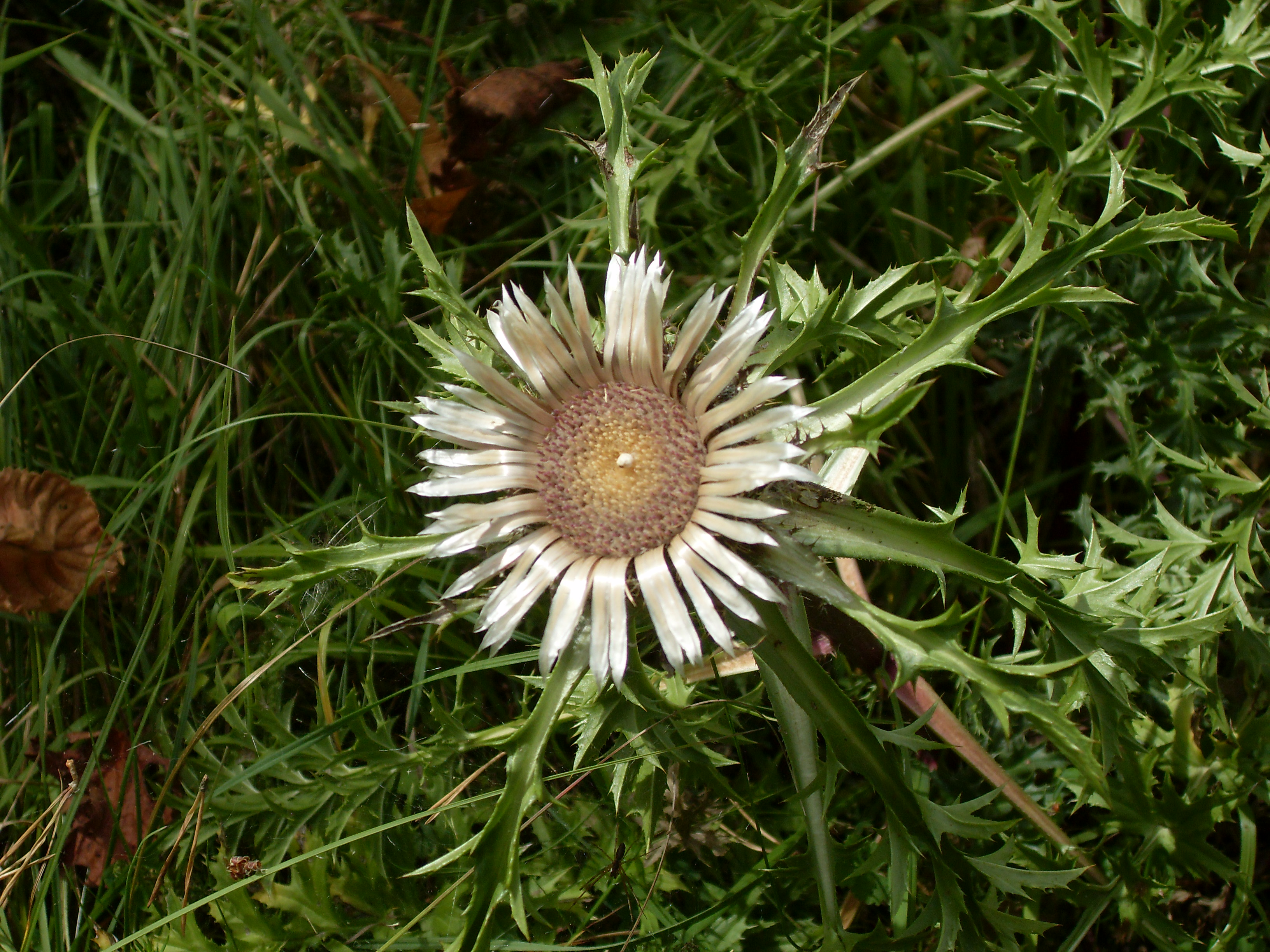 Die Silberdistel blüht auf Heideflächen im Heckengäu